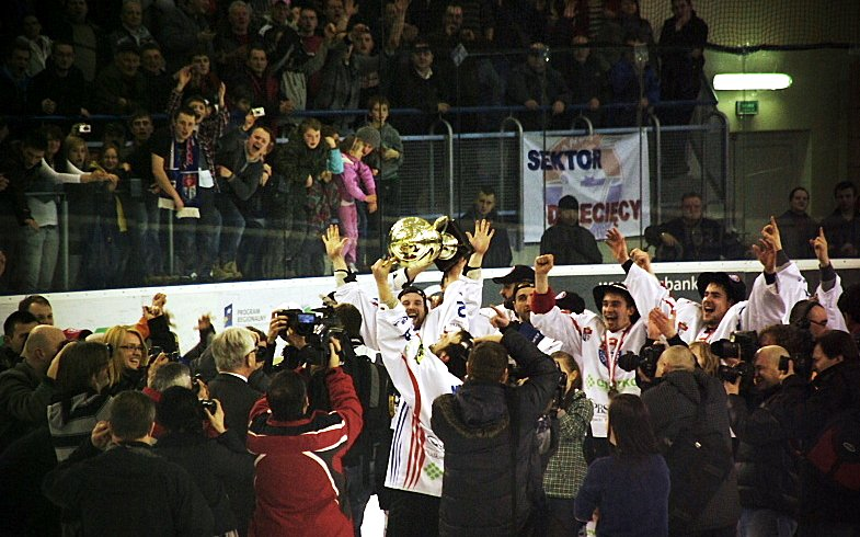 Puchar w rękach kapitana drużyny Ciarko PBS Bank Sanok, Macieja Mermera, po zdobyciu Mistrzostwa Polski w hokeju na lodzie 2011/2012. (Arena Sanok, 14 marca 2012)